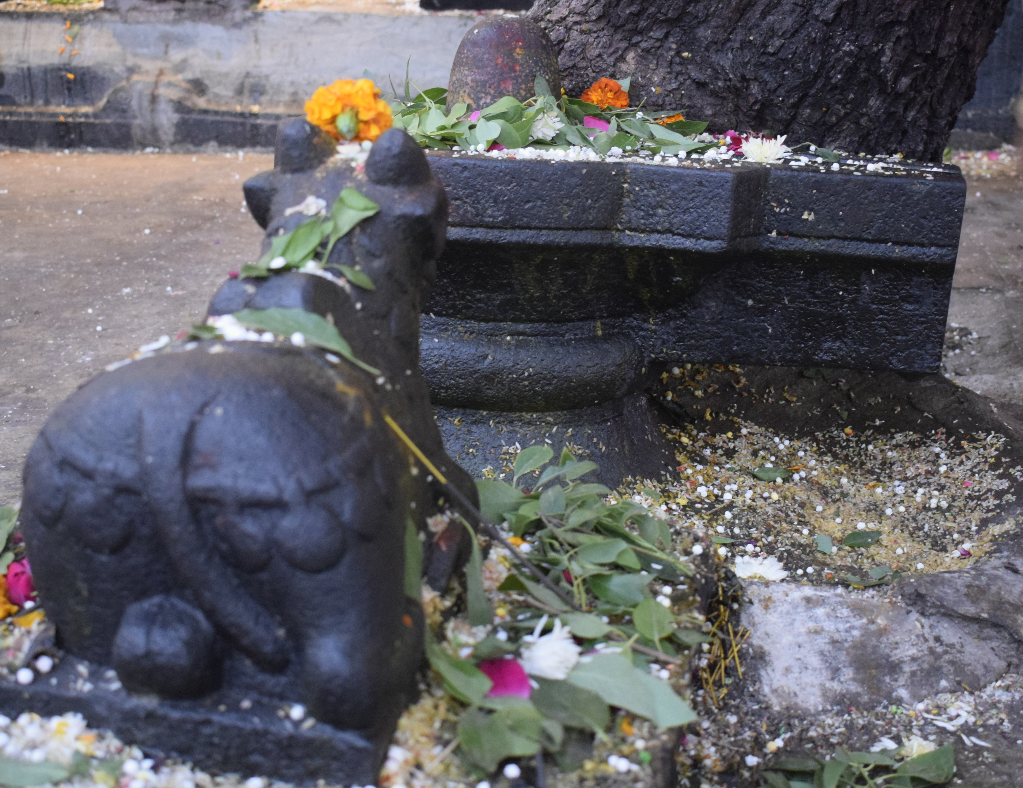 श्री आहेश्वर लिंग